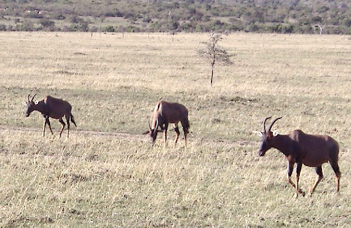 Topi (Damaliscus lunatus jimela). Damaliscus lunatus topi Massaï-Mara, Kenya